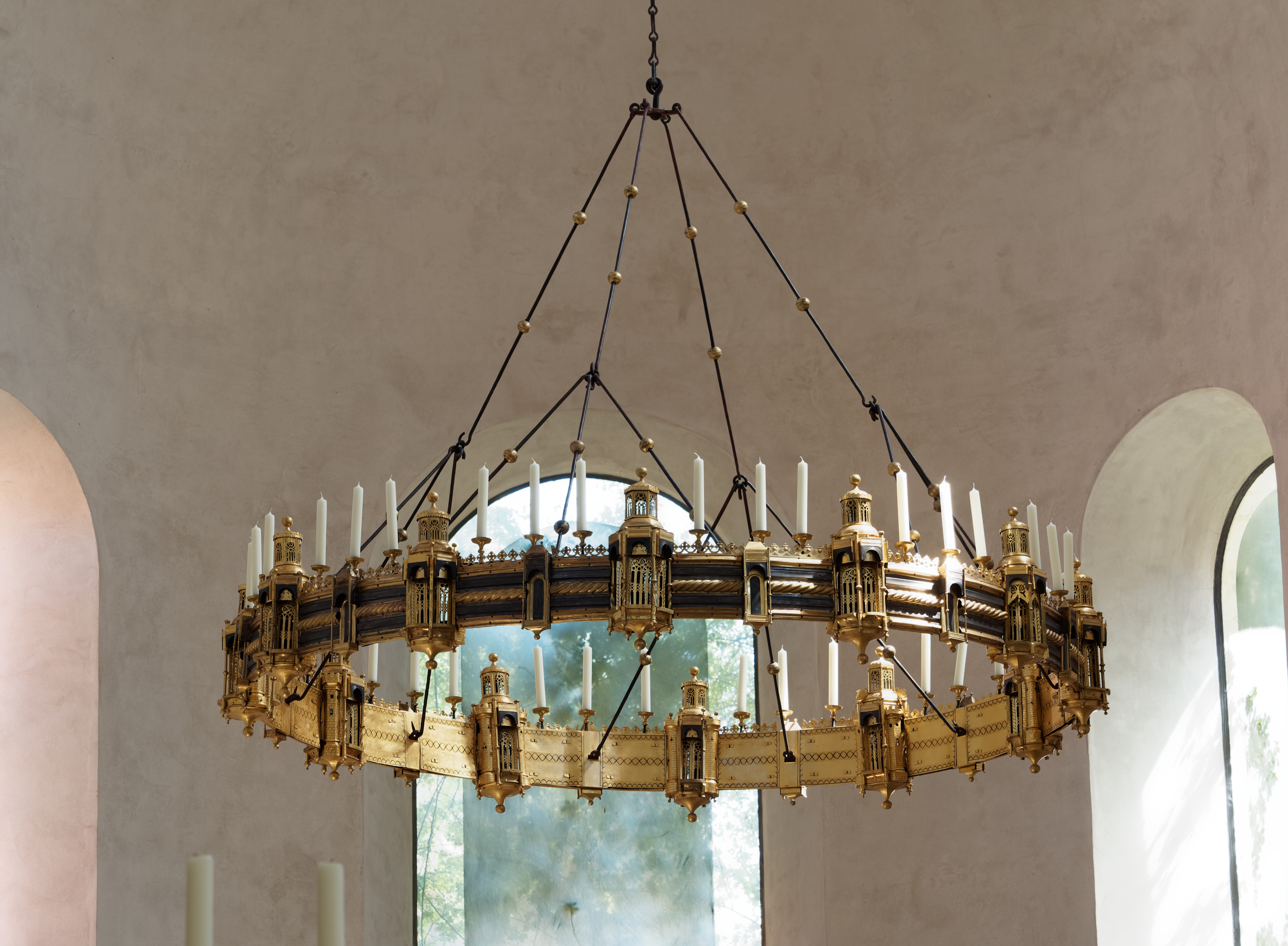 Hildesheimer Dom, St. Mariä Himmelfahrt, der Thietmarleuchter aus dem 11. Jahrhundert im Chor hinter dem neuen Altar.